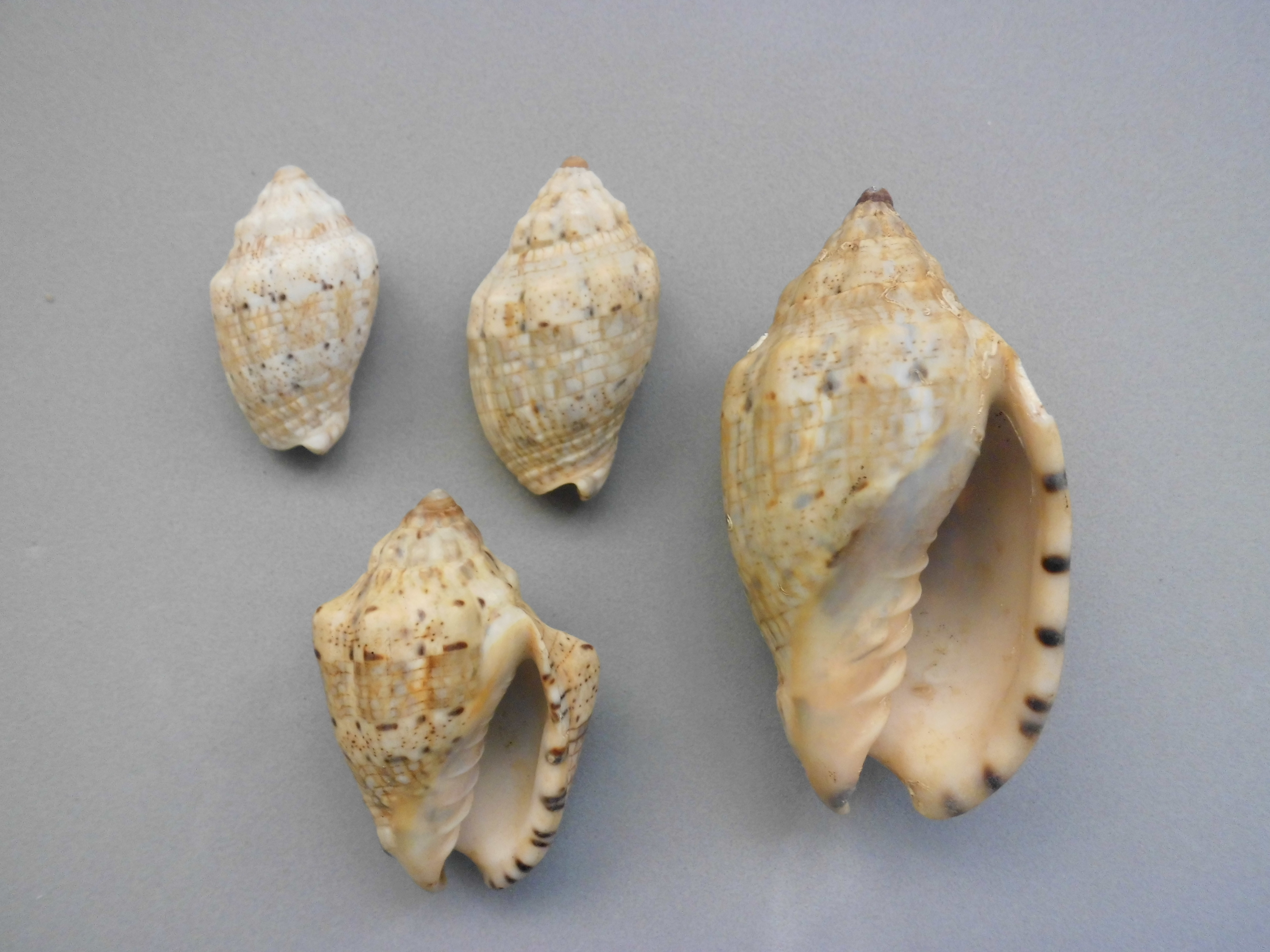 Voluta musica Linnaeus, 1758 Cayo Bubi Archipiélago Las Aves, Dependncias Federales - Venezuela